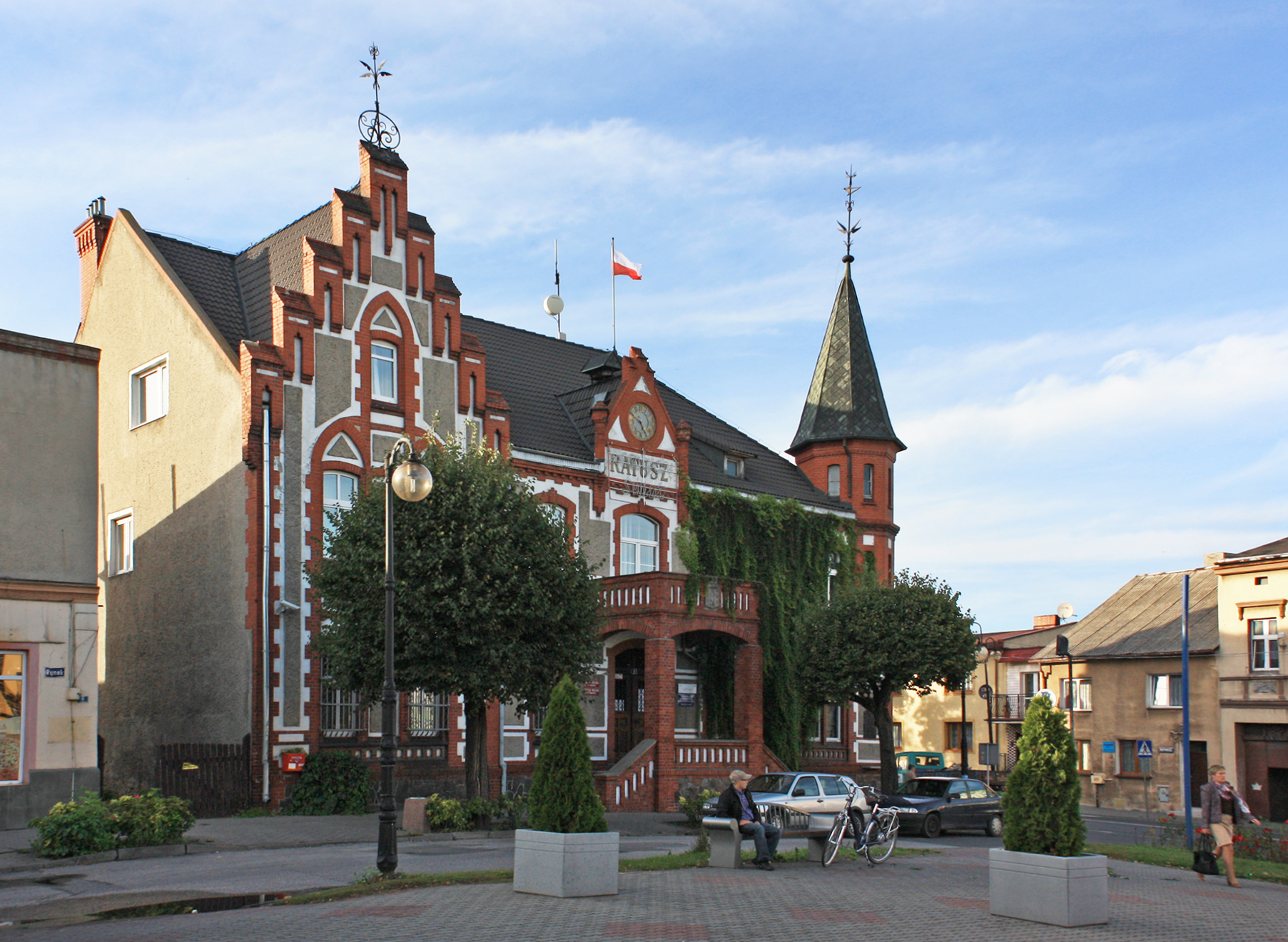 ratusz, 1908